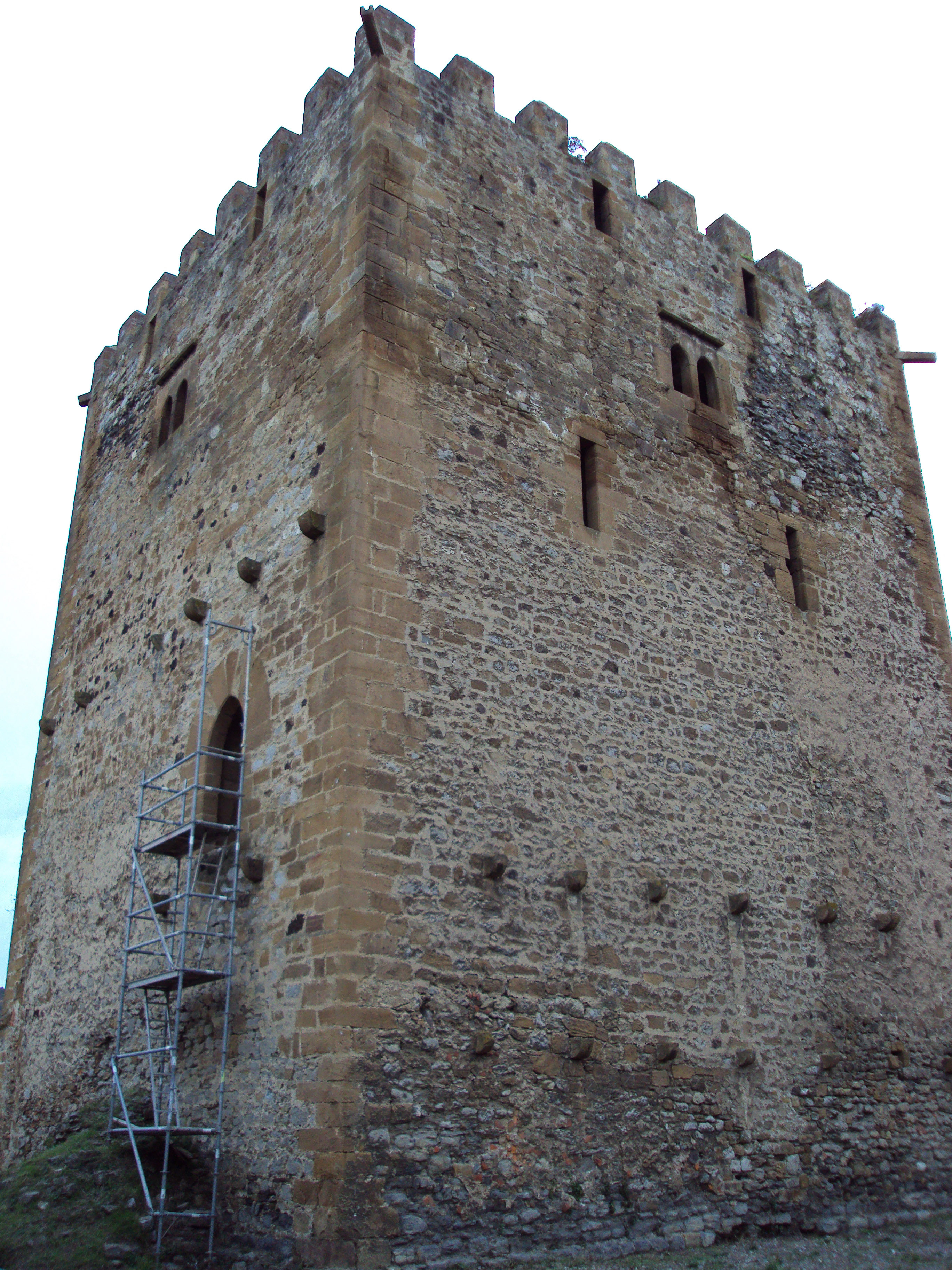 Muñatoizko San Martin gaztelua